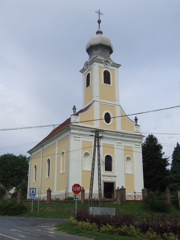 A galamboki Urunk mennybemenetele katolikus templom kívülről